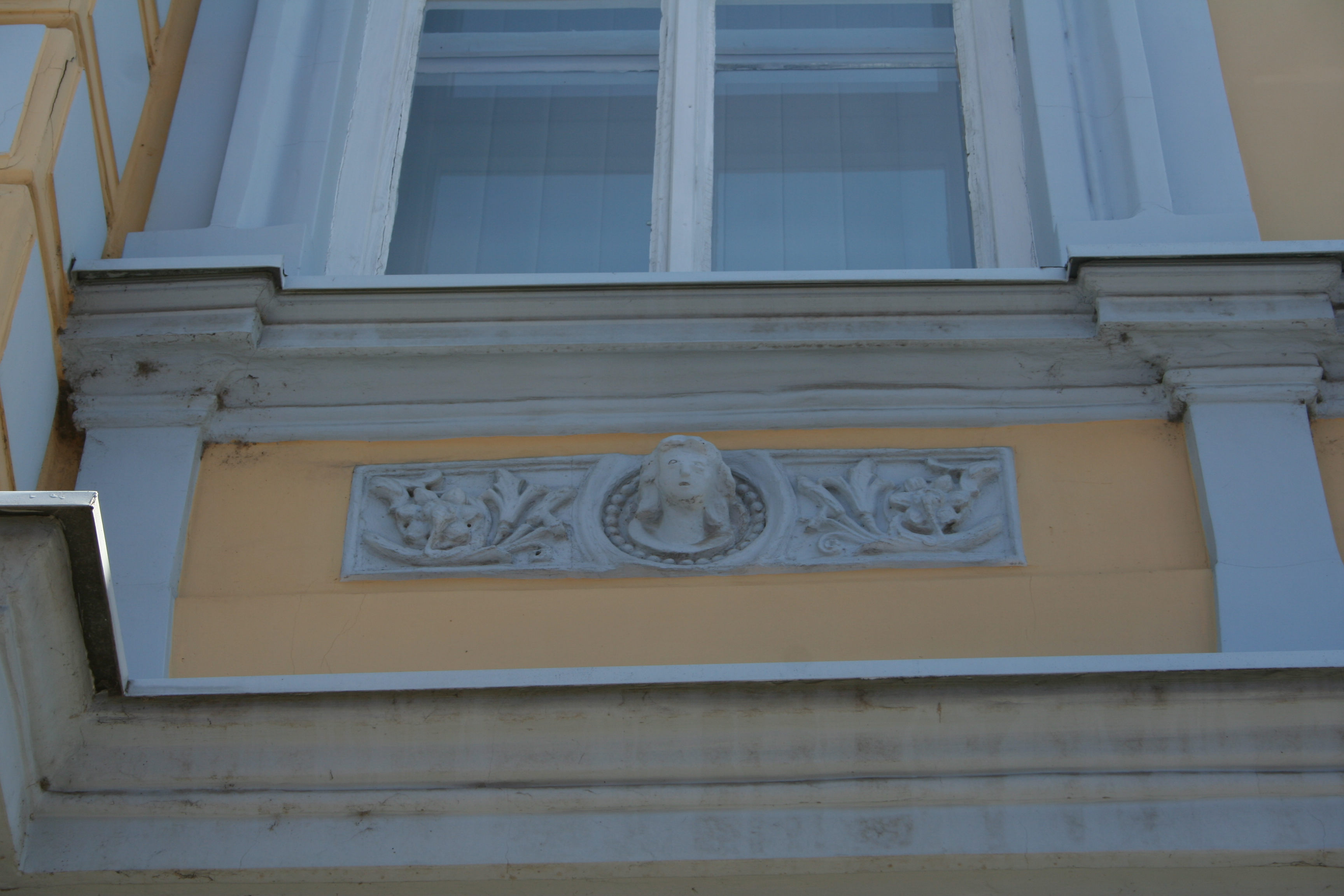 Kuća Katića sa galerijom Miće Popovića, Loznica